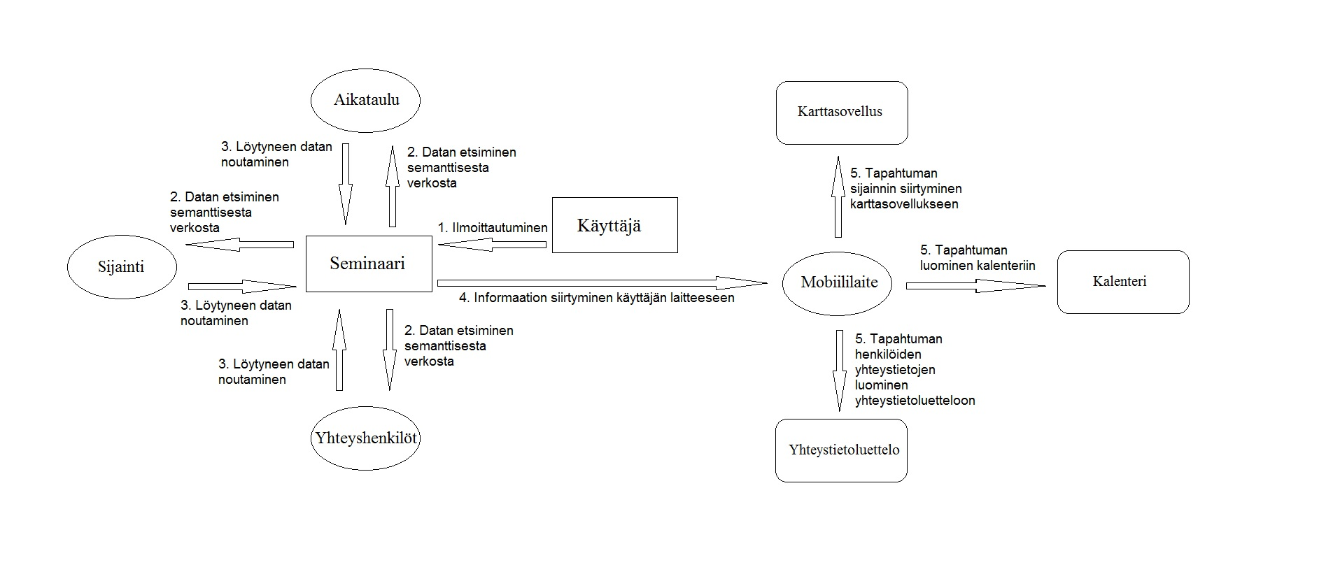 Esimerkkitapaus kuvattuna kaaviona. Semanttisen webin käyttöä kuvaavat kaikki muut nuolet paitsi nro 1.